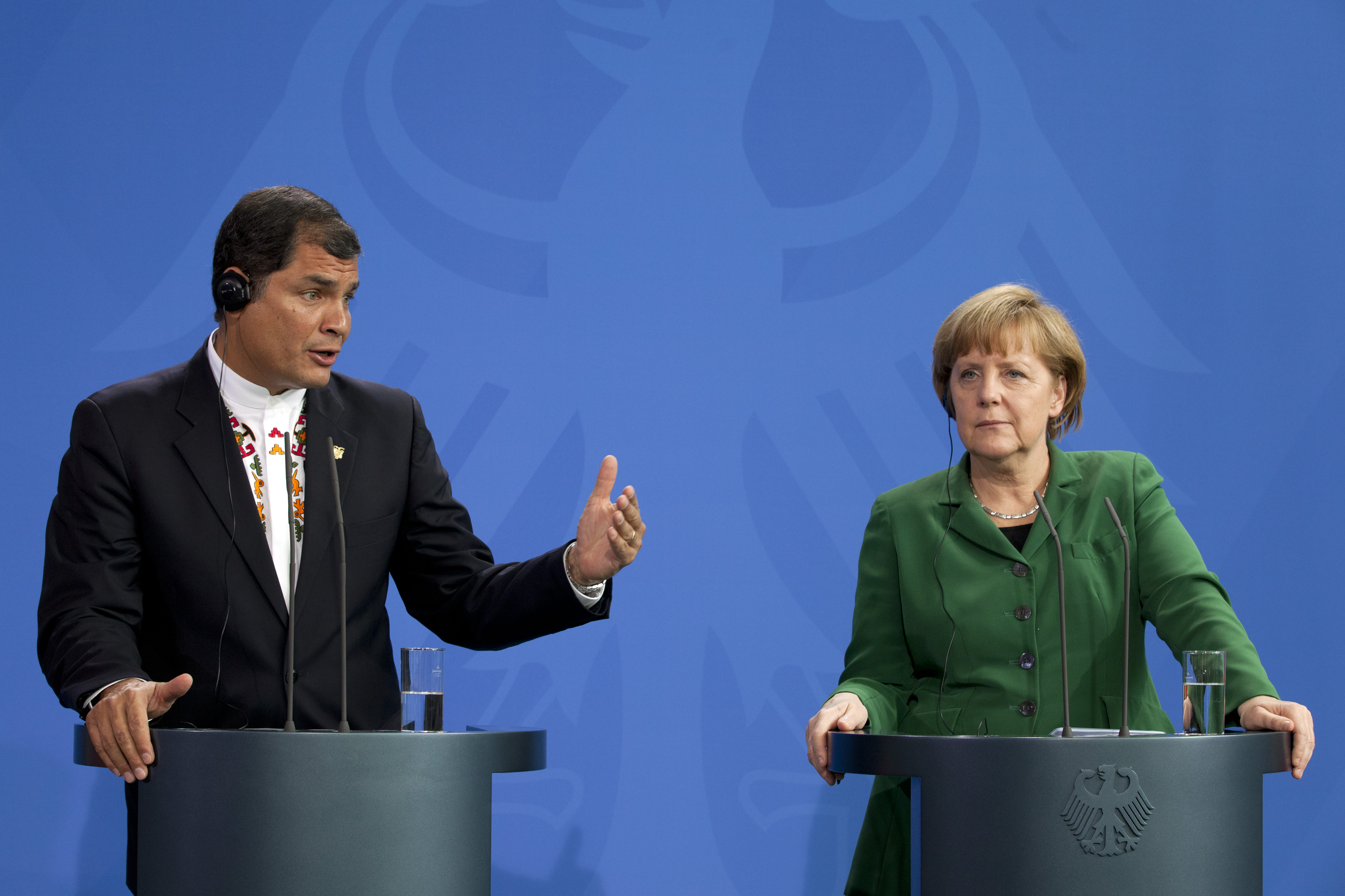 Berlín (Alemania), 17 de abril de 2013. El Presidente del Ecuador, Rafael Correa, y la Canciller alemana, Ángela Merkel, ofrecieron una rueda de prensa en la Cancillería. Foto: Fernanda LeMarie - Cancillería del Ecuador.